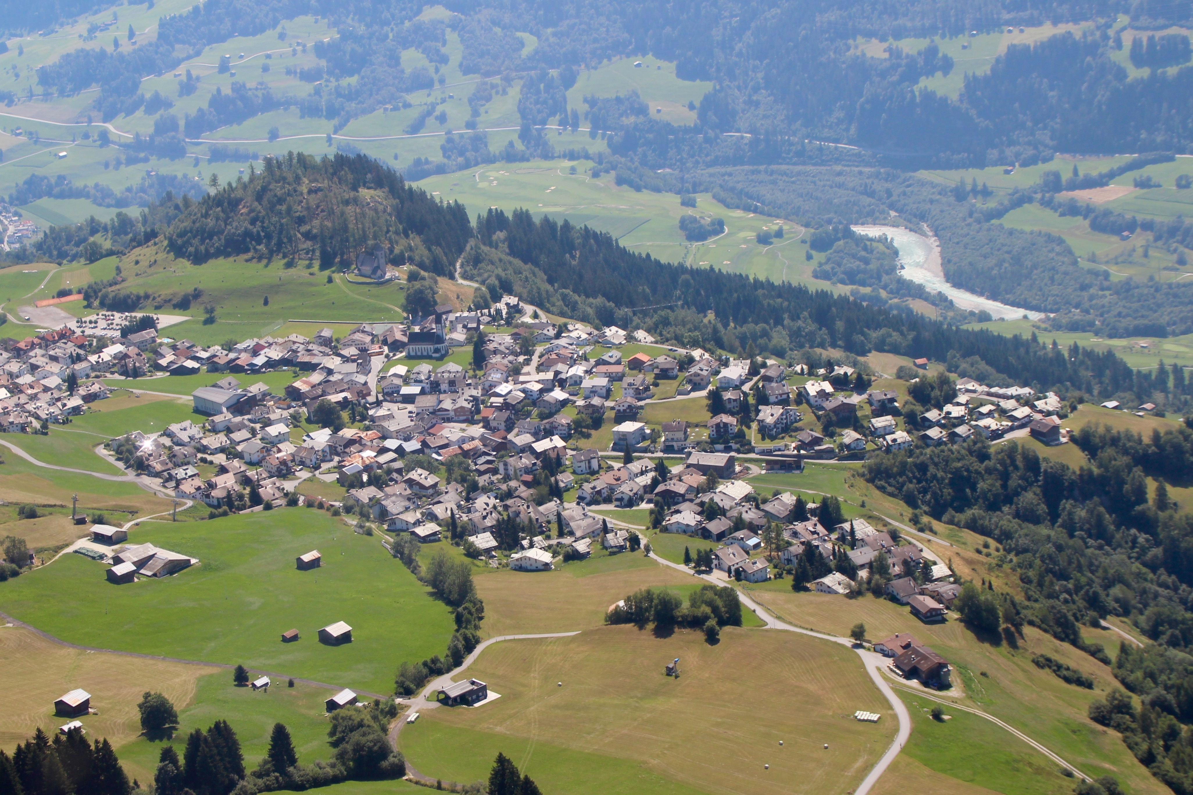 Falera